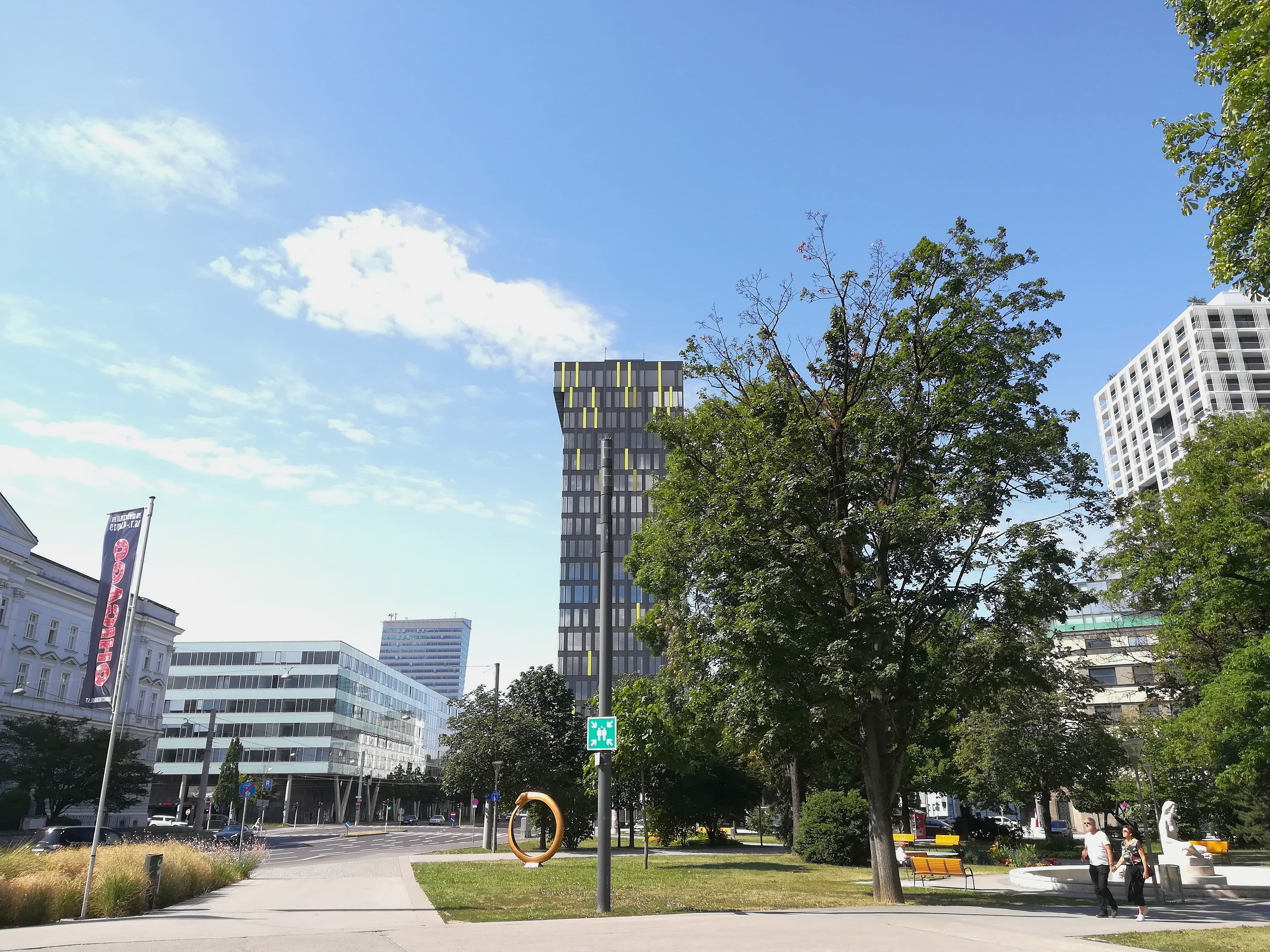 links hinten: Terminal Tower, in der Mitte: Power Tower, rechts: Lux Tower, rechts vorne beginnt der Volksgarten